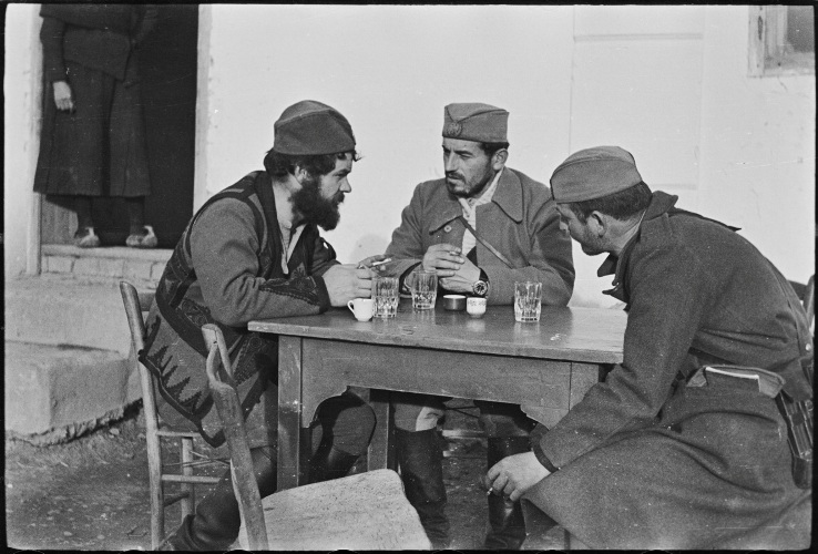 Aleksandar Simić (Čačak, 1923 — Čačak, 14. oktobar 2007) bio je jedan je od prvih i najpoznatijih čačanskih fotografa, poznat i kao jedan od fotografa Jugoslovenske vojske u otadžbini. Za vreme Drugog svetskog rata nalazio se u Vrhovnom štabu kod Dragoljuba Draže Mihailovića gde je napravio veliki broj fotografija.